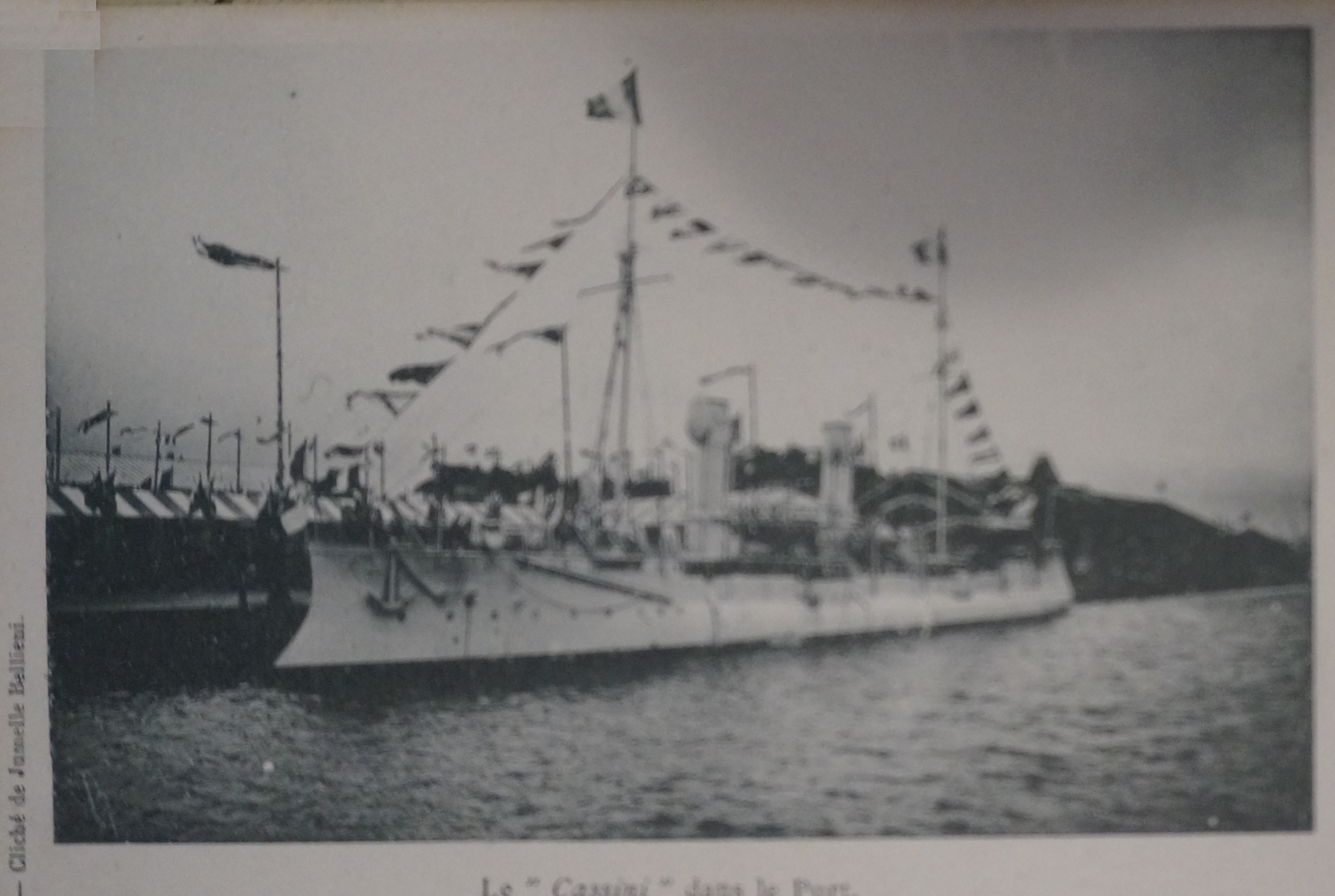 lors des Grandes maoeuvrves de l'est de 1901. BM Reims cote CPA t4. Publication de 1901 en cartes postales.